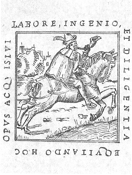 Titelblatt des Handbuchs für Postreisende "Itinerario Delle Poste Per Diverse Parte Del Mondo"